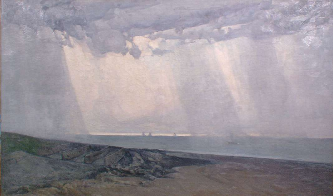 Typische coloriet tijdens onweer, bron van zg. 'Scheldeluminisme'